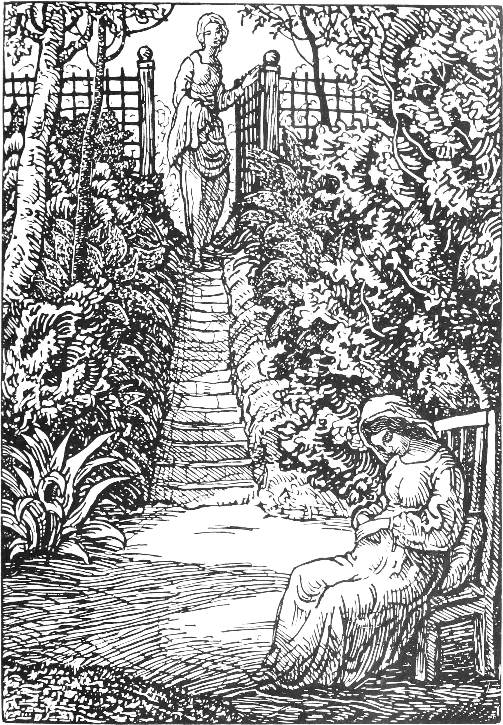 Heimsuchung